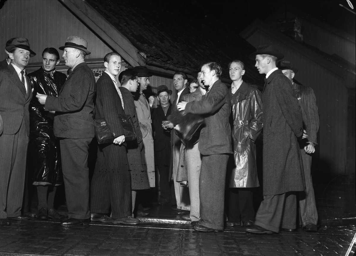 Ved Sota-hjørnet på Vålerenga. Fra venstre: Rolf Grønby, Stein Mangseth, ukjent, Knut "Biri" Wikerholmen, Tor Larsen, Roger Perets, Ingvald "Kinger'n" Larsen, VIF's største spiller gjennom tidene "Tippen" Johansen, ukjent, ukjent, Finn Hugo Skoglund, "Jarlen", Reidar "Reier'n" og Erling "Murer'n" Knutsen.